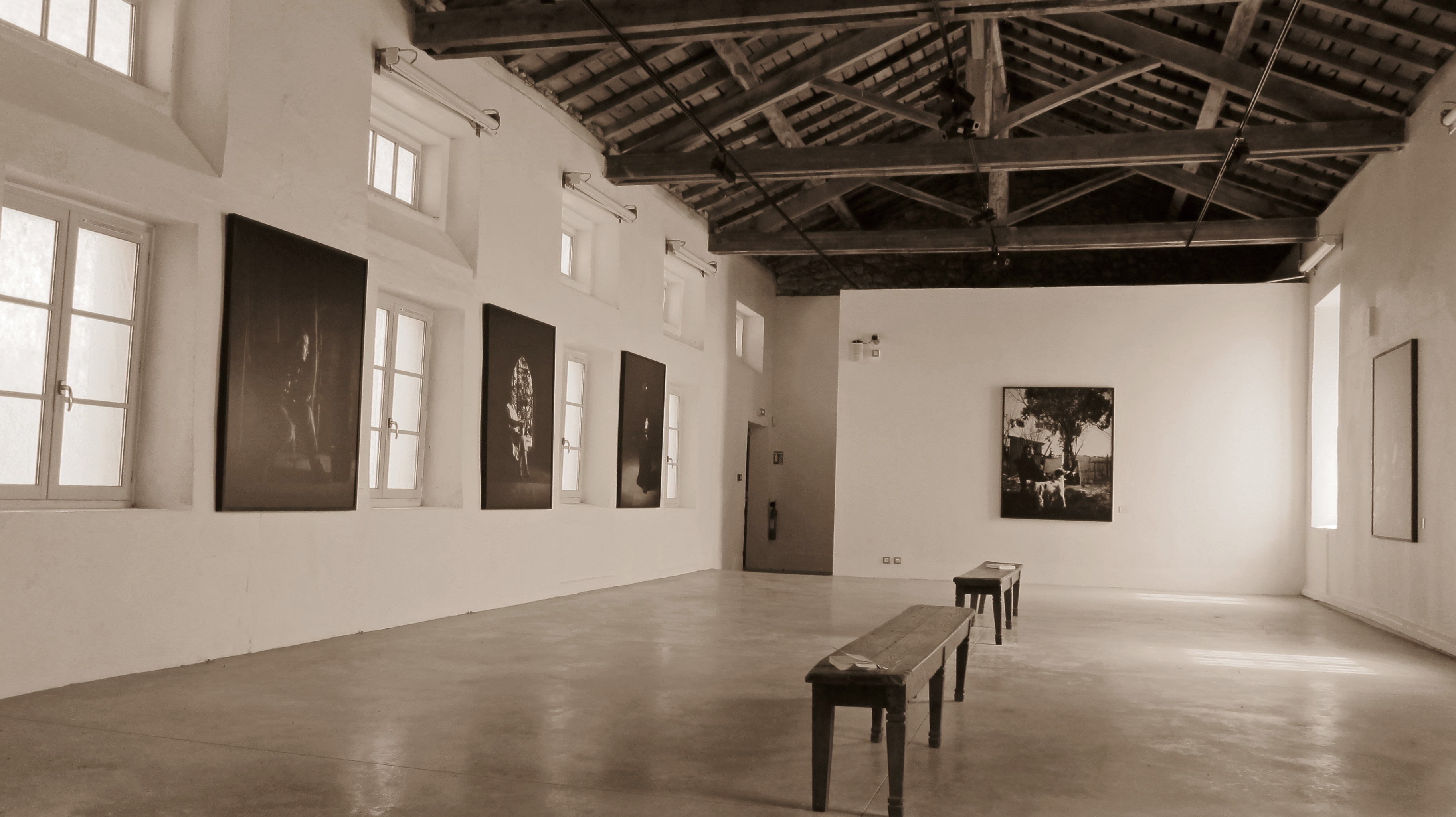 Saint-Lizier (Ariège, Midi-Pyrénées, France) : Expositions de photographies de Frédéric Nauczyciel au Musée du Palais des Évêques.